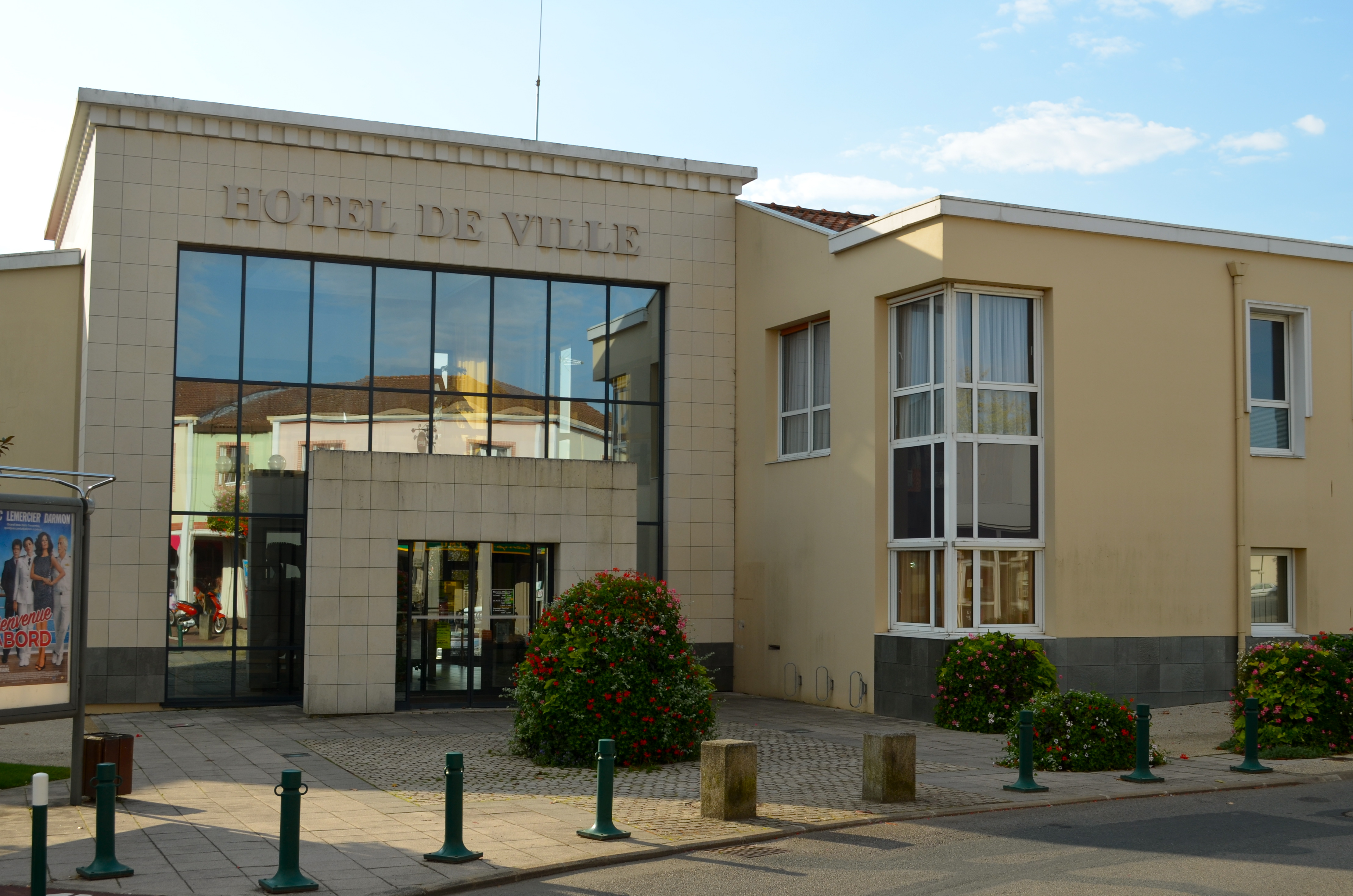 Hôtel de Ville - Le Loroux-Bottereau